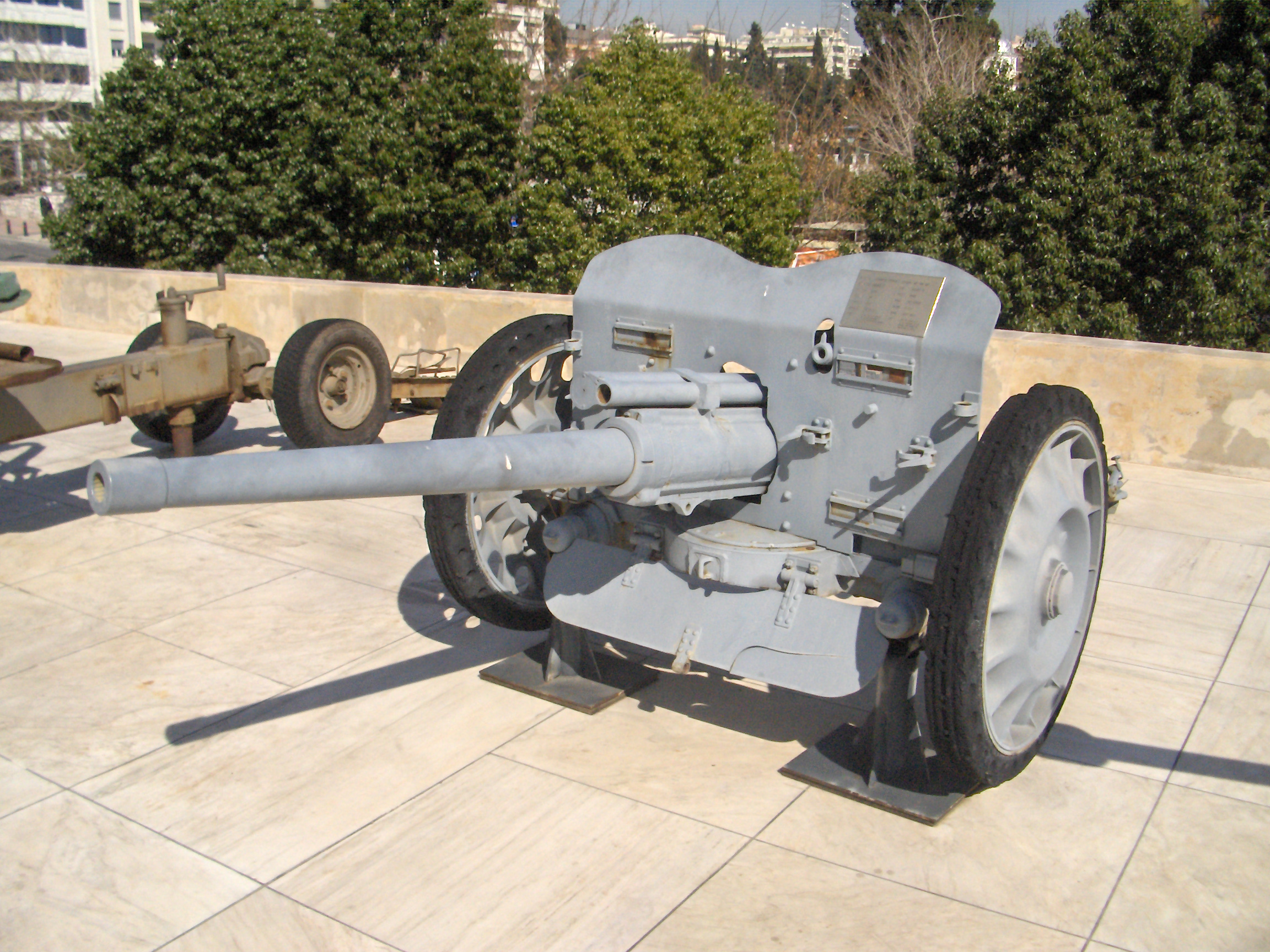 Exhibit at the War Museum in Athens. Geschutz 47 47mm antitank gun